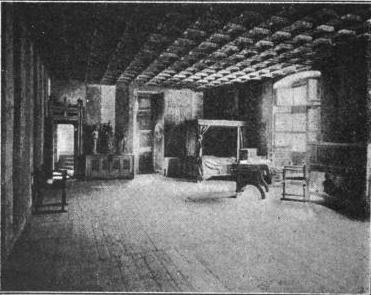 La "sala del Re di Francia" nel castello di Issogne